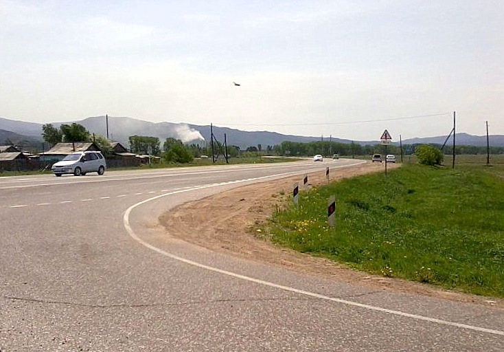 Федеральная трасса Р258 "Байкал" от съезда на Кабанск напротив станции Тимлюй. Вдали - дымящие трубы Тимлюйского цементного завода в пгт Каменске.